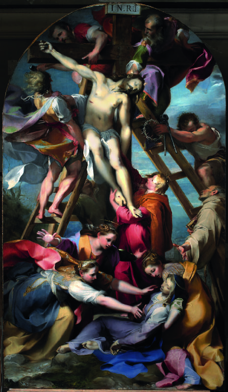 Deposizione della croce, Cattedrale di San Lorenzo, Perugia (1569).